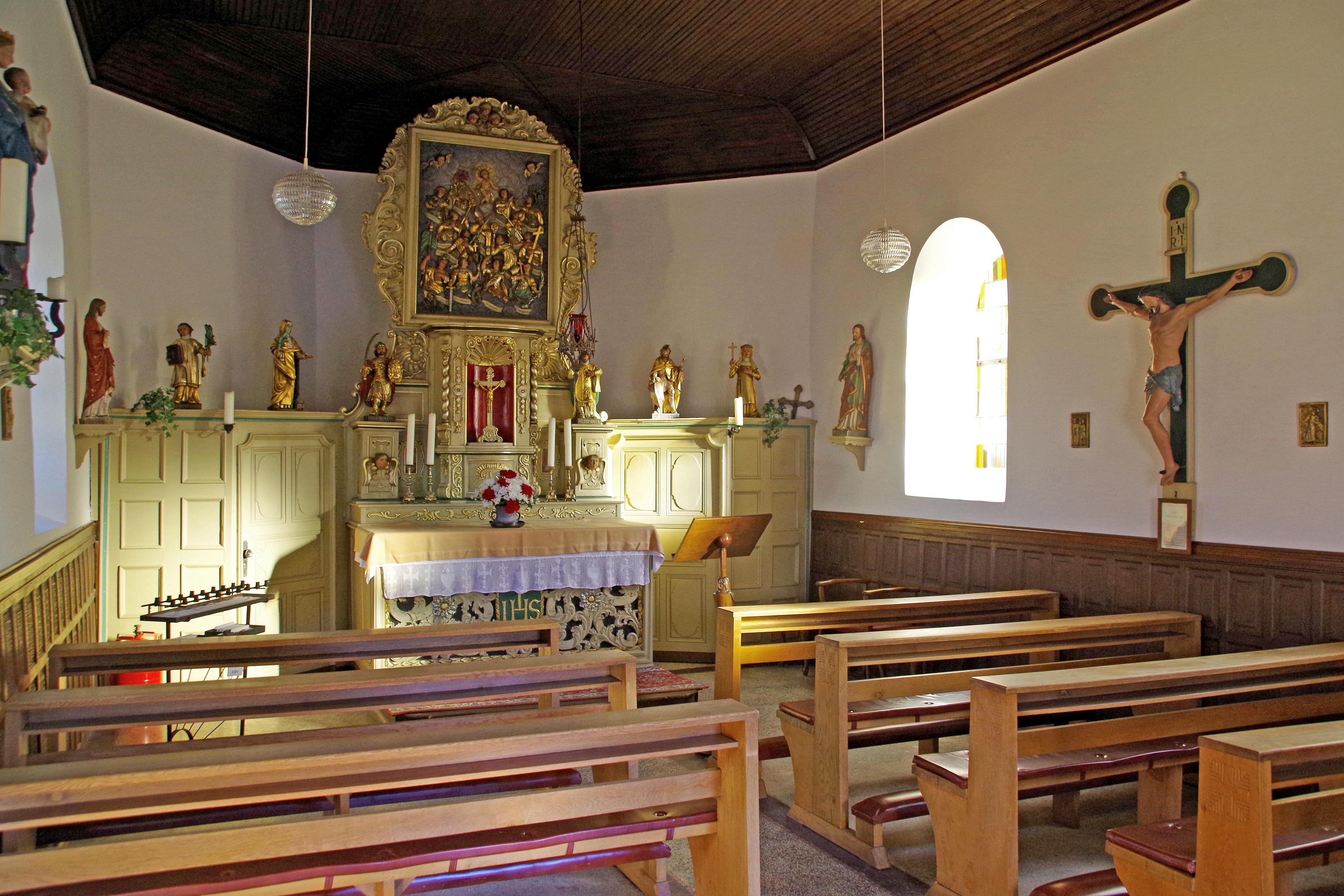 Sankt Quirinus (Bauler), Innenraum mit Barockaltar um 1700